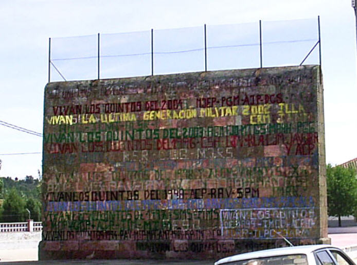 Frontón cara norte